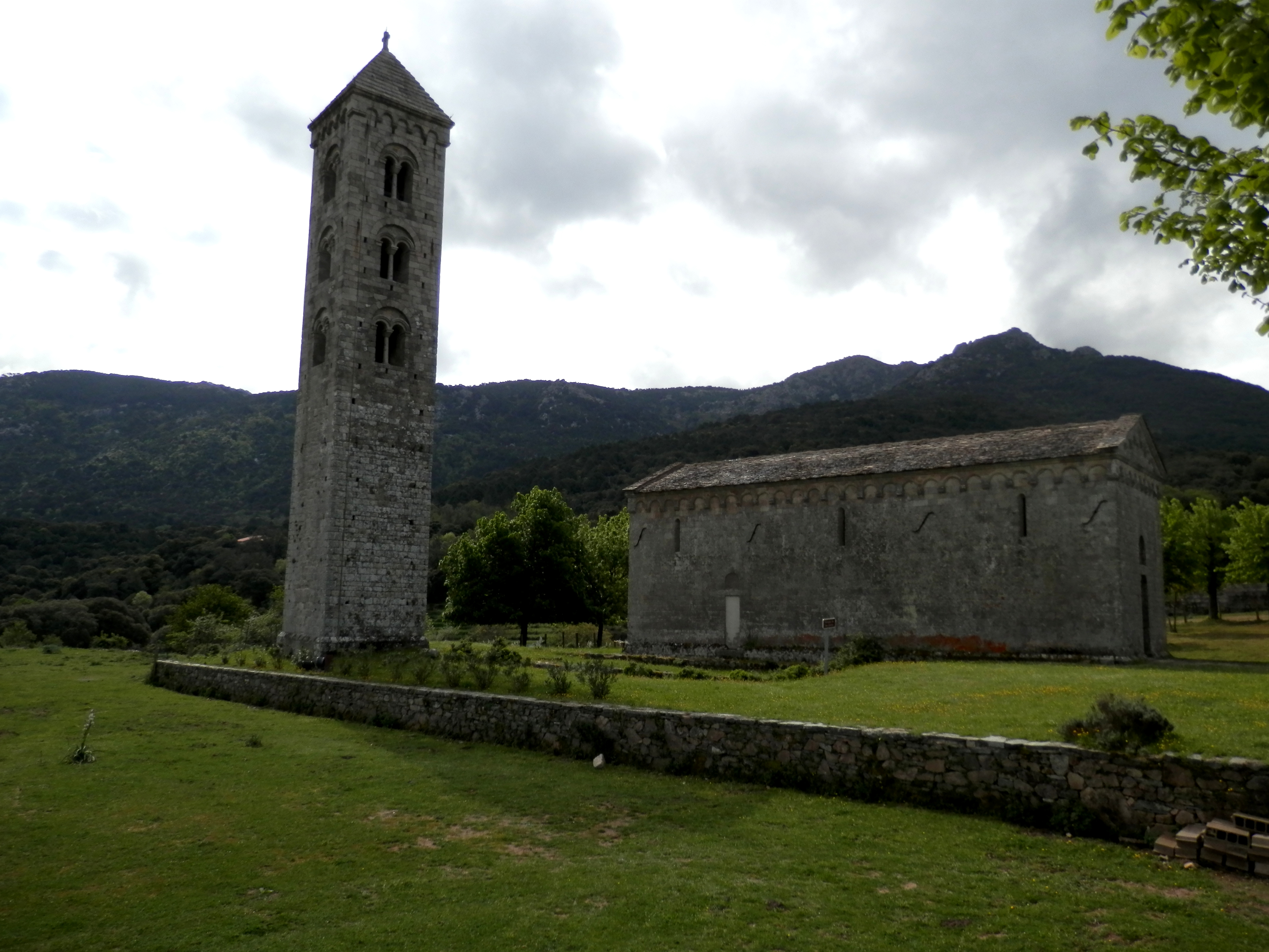 Corsu: U campanilu di a ghjesgia di Càrbini